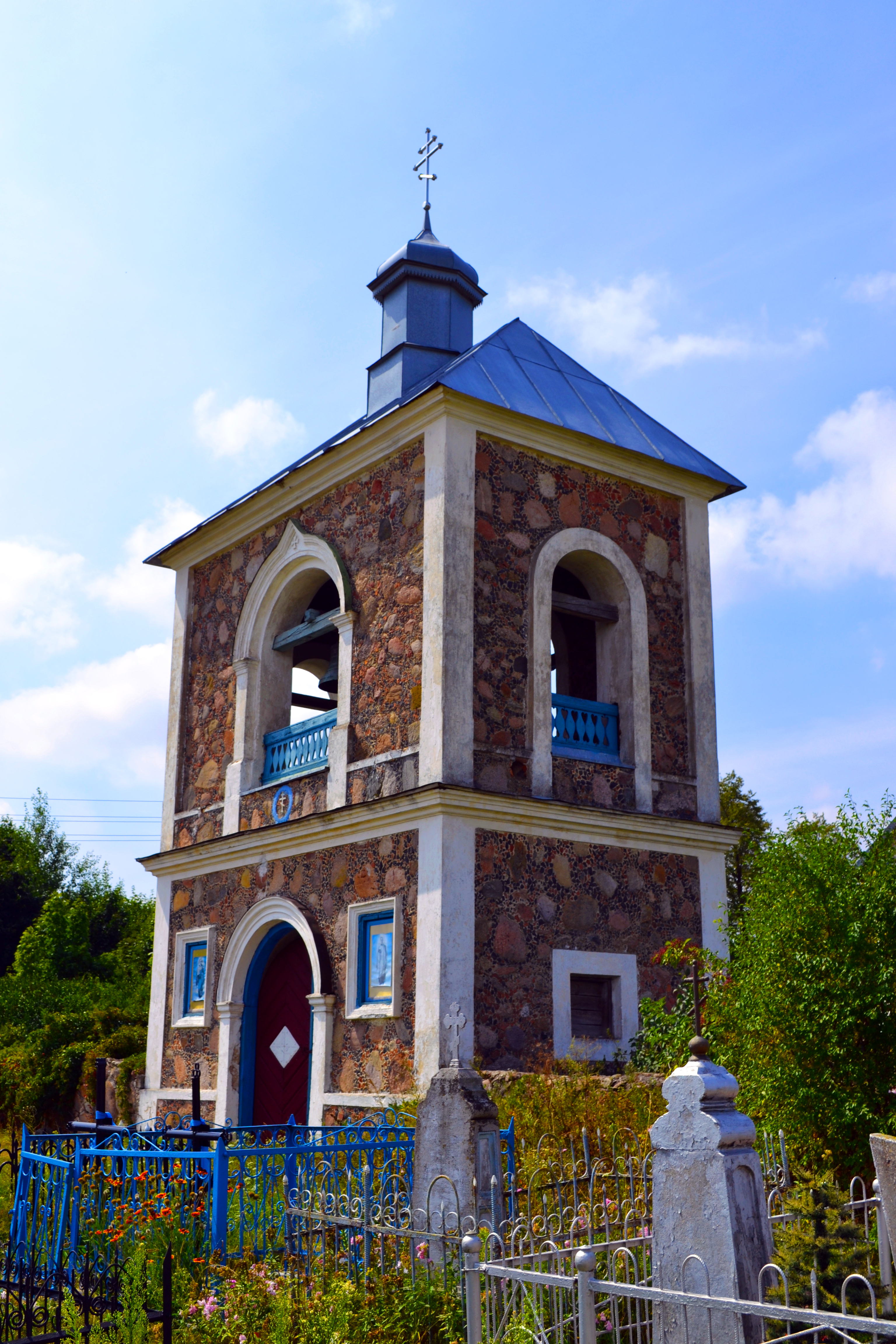 Беларуская (тарашкевіца): Крыжаўзьвіжанская царква ў Зельзіне (Пружанскі раён). This is a photo of Belarusian heritage monument. Reference number: 113Г000609 ( WLM)